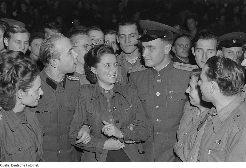 Original image description from the Deutsche FotothekAngehörige der sowjetischen Armee in weiblicher Begleitung im Publikum einer Veranstaltung zum Gedenken an die Völkerschlacht